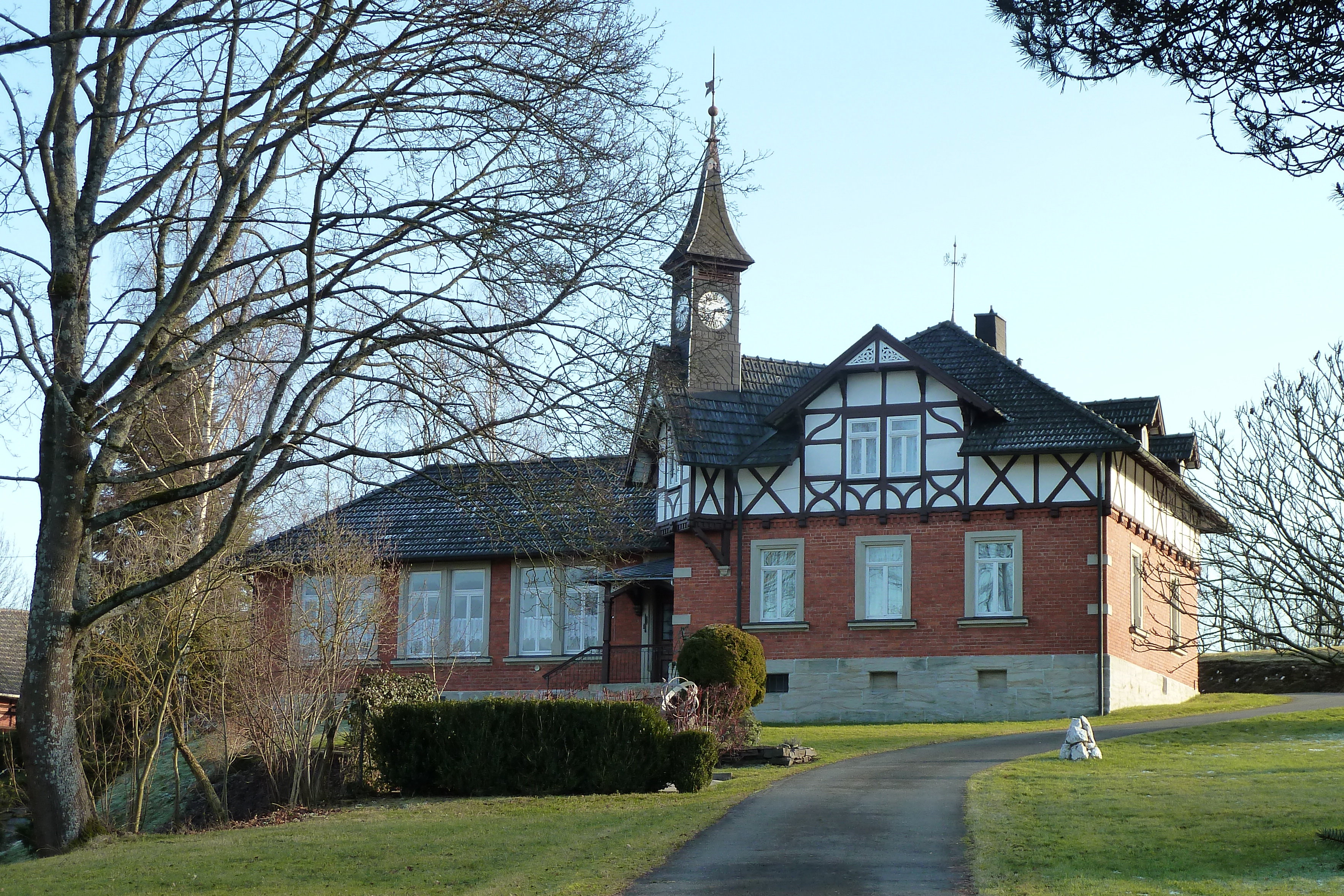 Ehemalige Schule in Waldsachsen, Am Bausenberg, OT von Rödental